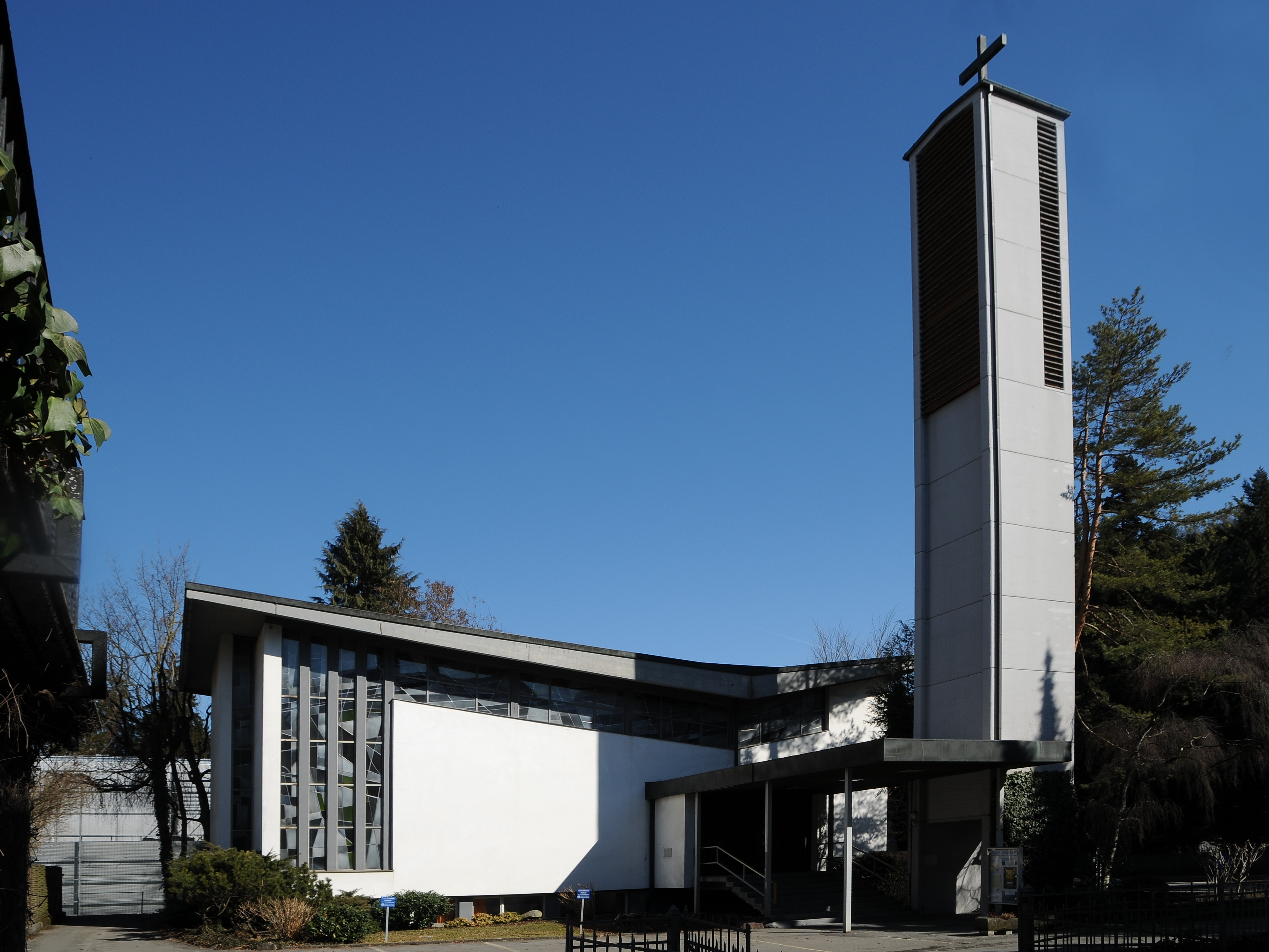 aus dem DEHIO Vorarlberg 1983: Feldkirch Levis Bermanngasse Nr.2 (Evangelische Pauluskirche). Saalbau mit freistehendem Turm. - Saalraum mit nach vorne ansteigender Flachdecke, erhöhter Altarraum mit eingezogenen Schrankwänden, über der Orgel Dach ansteigend. Am Eingang Betonglasfenster, Entwurf "Horst Beck, Höldingen"; Ausführung "Nik Dierig Überlingen".